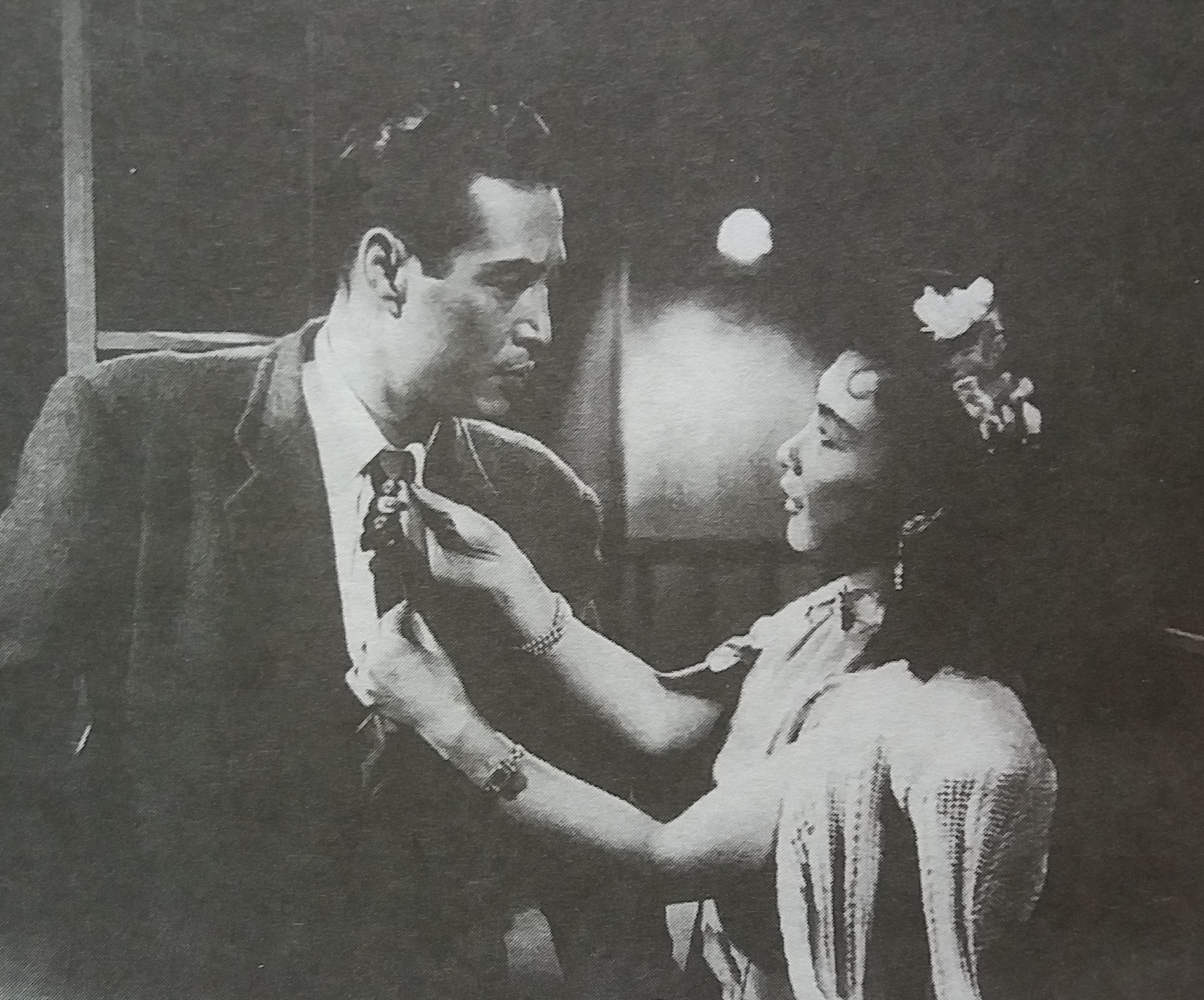 金焰与路珊在《成龙快婿》